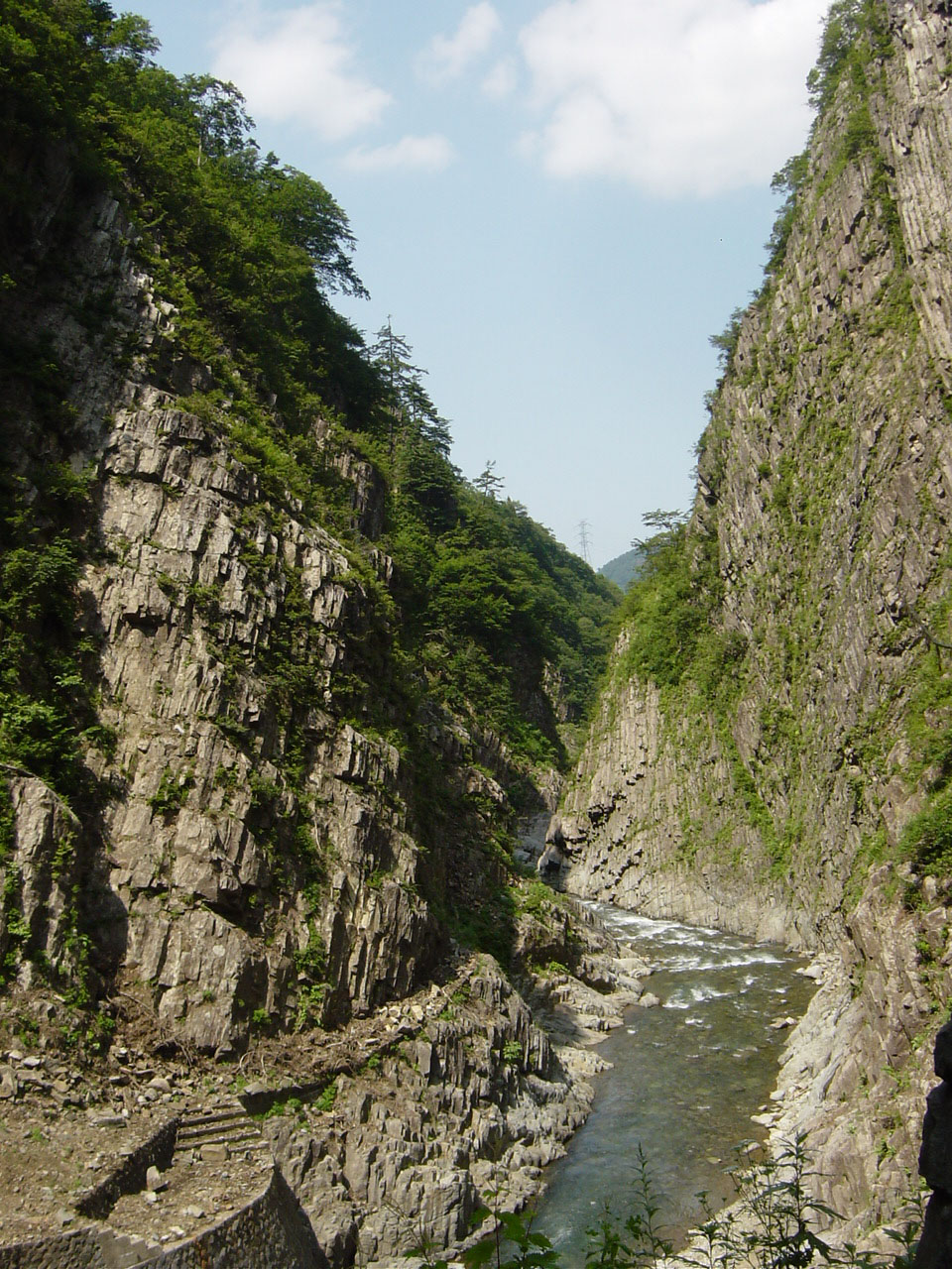 新潟県十日町市 夏の清津峡（2006年8月13日 投稿者が撮影）